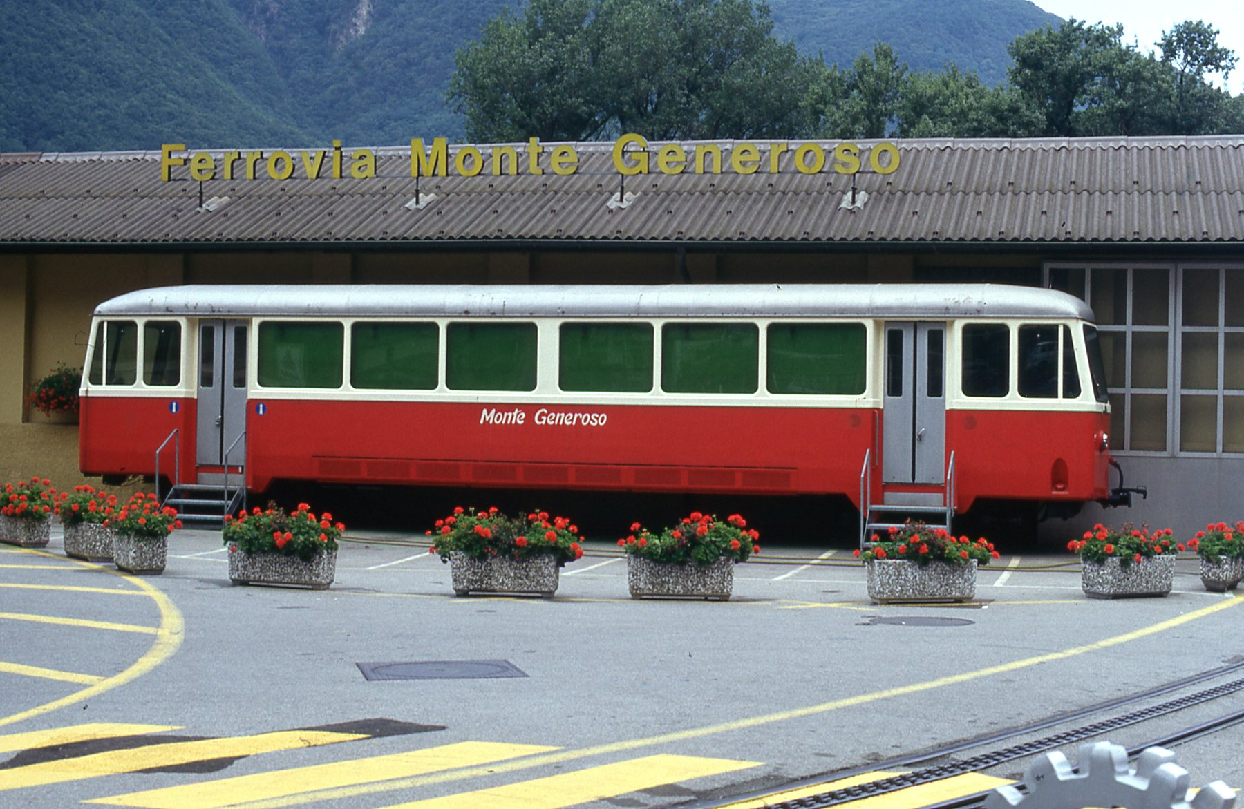 Photo: Trams aux Fils. Après son électrification en 1982. Pour les amateurs, il y a sur cette ligne un train à vapeur, le 4 juillet, 18 juillet 1er août, 15 août, 29 août, 12 septembre et 26 septembre 2010, au prix de 42 Euros aller-retour.